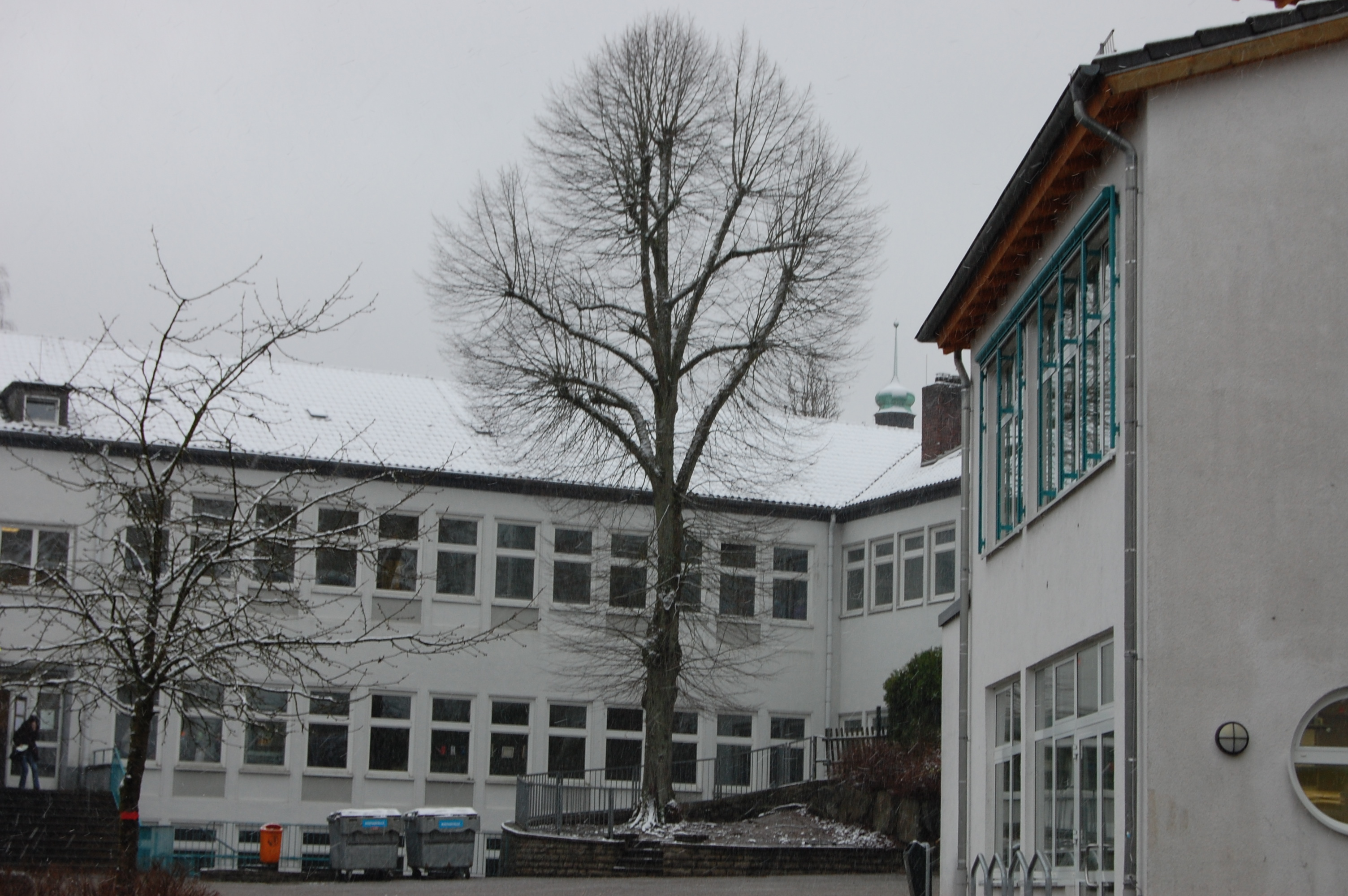 Ehemaliges Volksschulgebäude der Realschule Schalksmühle in Westfalen